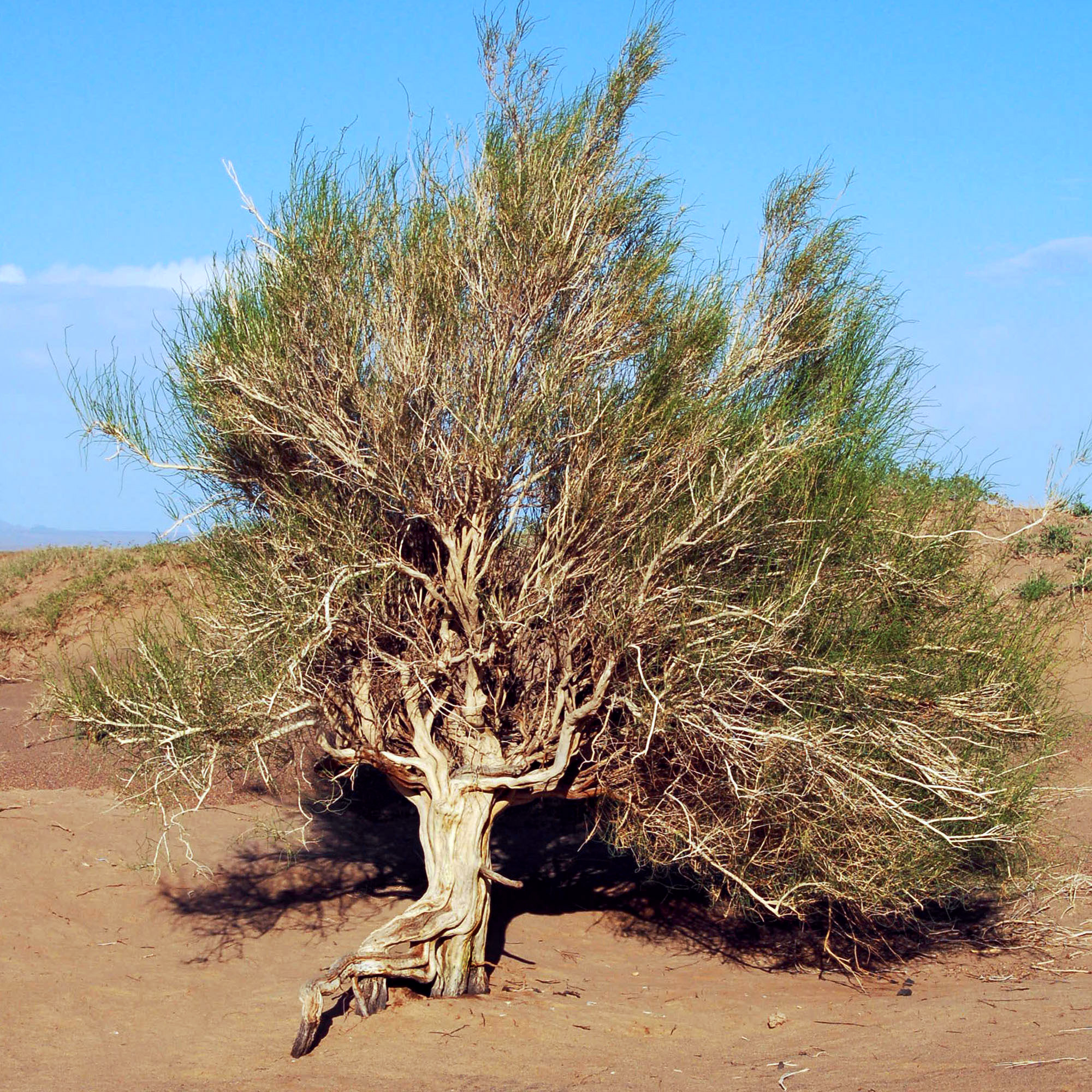 Saxaul (Haloxylon ammodendron) in Mongolia, Omnogovi aimag